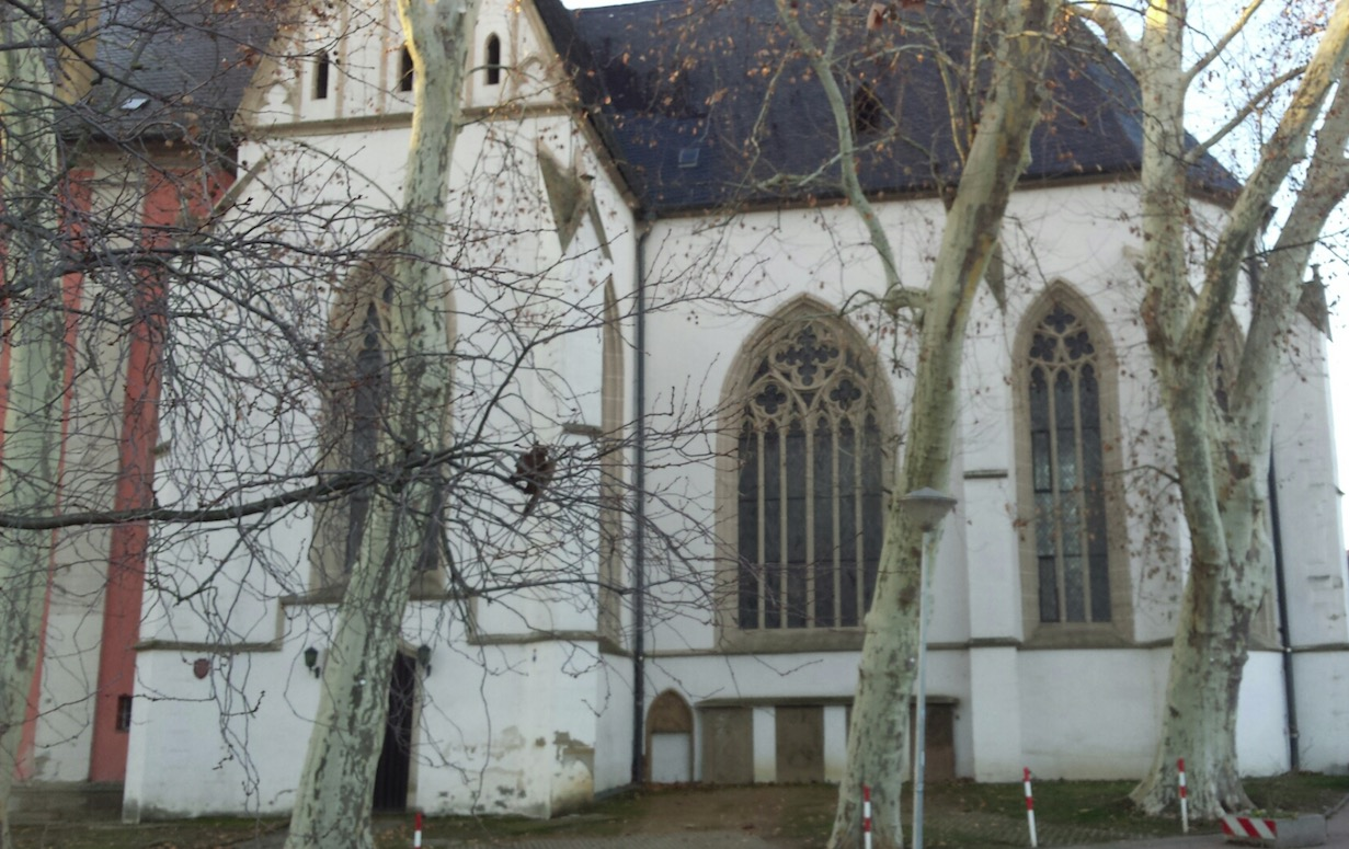 Pauluskirche Bad Kreuznach „Englische Kapelle“